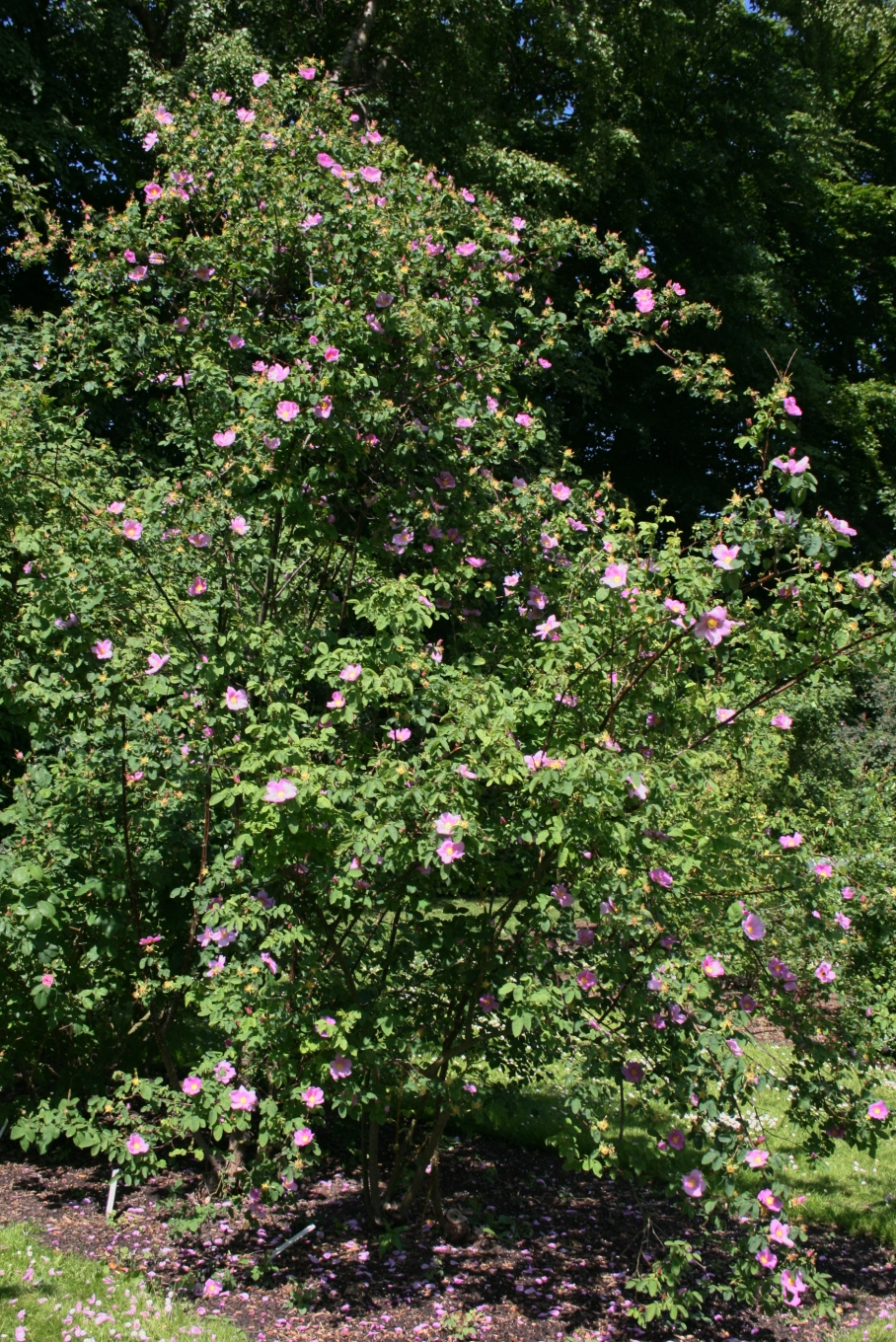 Rosa majalis: Habit.